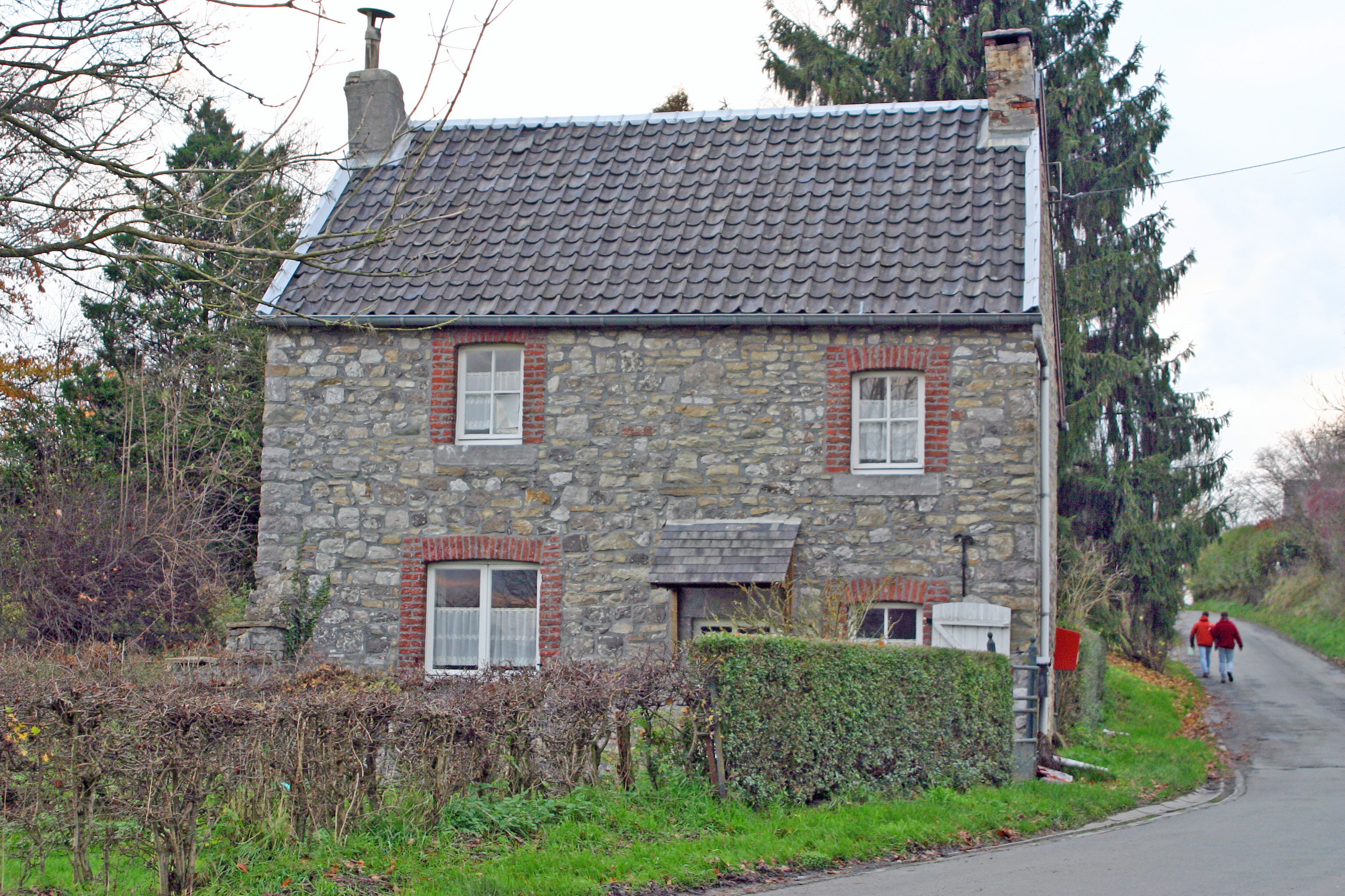 Doléinerhaus zu Hansez.